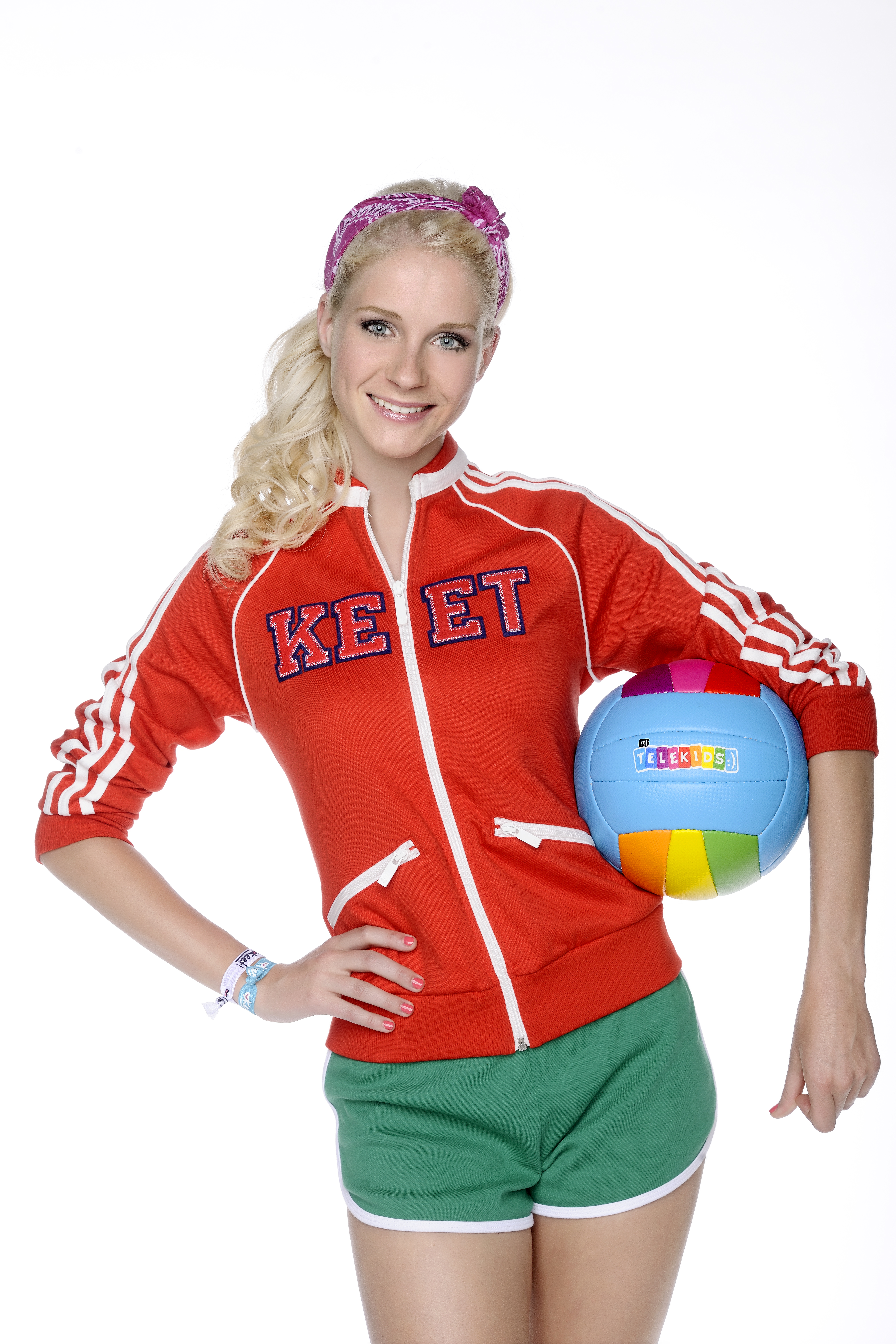 Keet!, alias Janouk Kelderman.